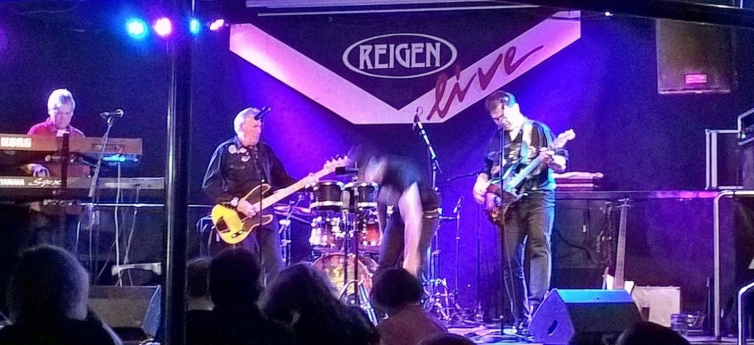 Konzertimpression. (Auftritt von Nick Simper & Nasty Habits und Präsentation des Albums De La Frog Conspiracy)